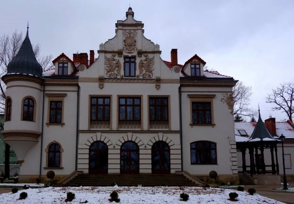 Palac Trzecieskich Krosno zwany "Pałacem Polanka